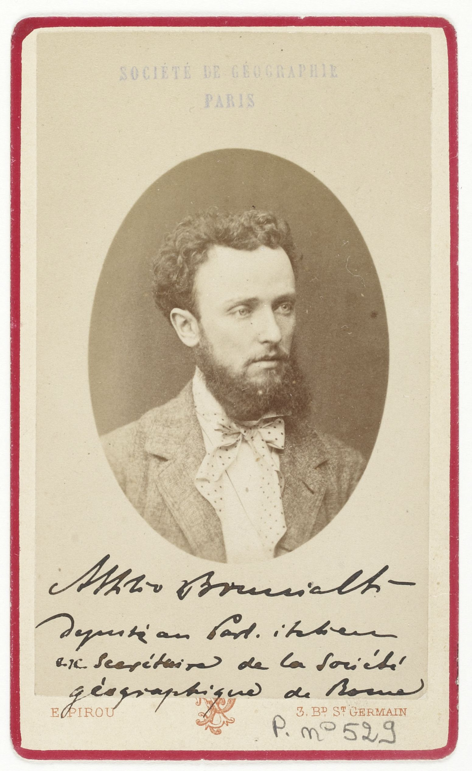 Attilio Brunialti. Fotografia su placca di vetro.